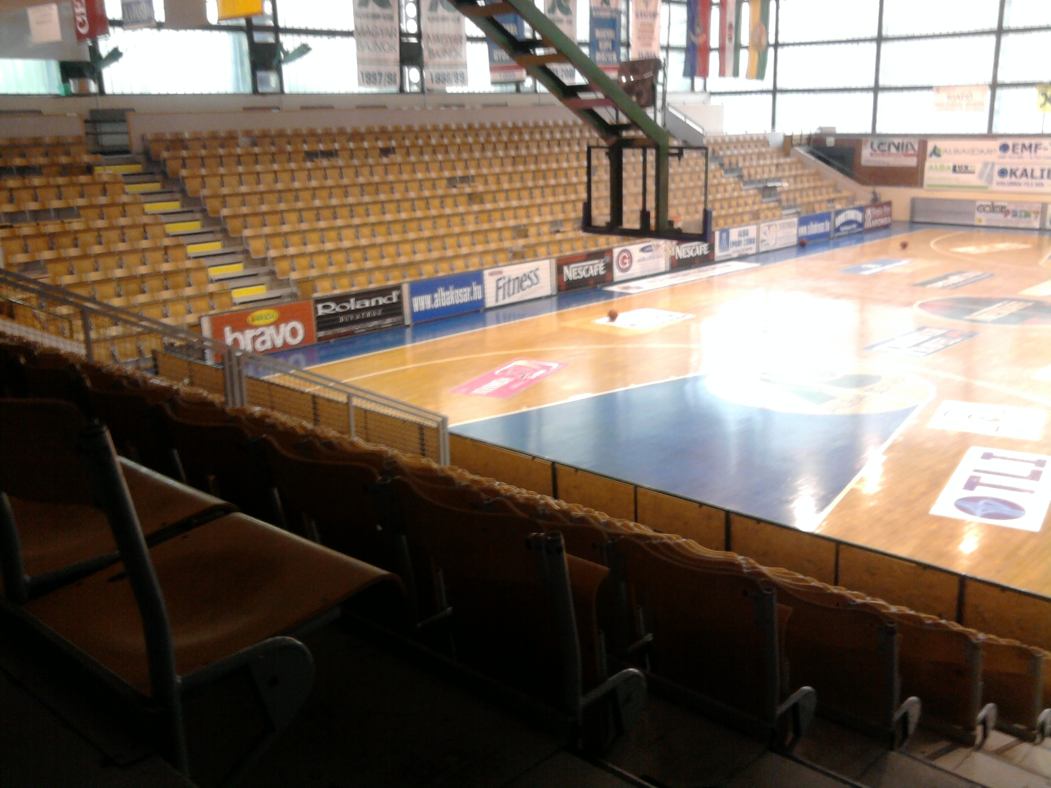 Az Arév sportcsarnok régi festése (Székesfehérvár)